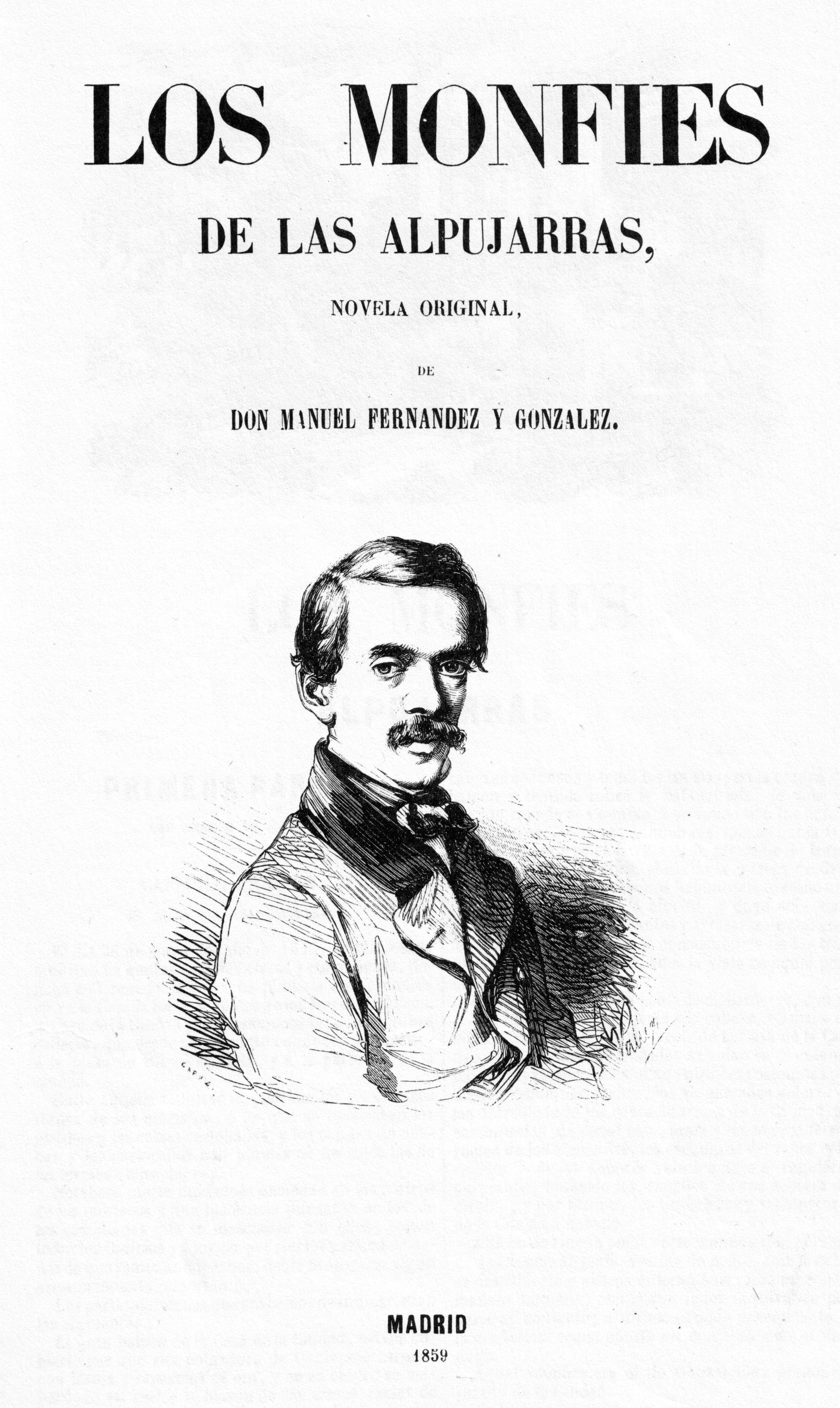 Incipit of the novel "Los Monfies de las Alpujarras" by Manuel Fernández y González (Sevilla, 1821 - Madrid, 1888)